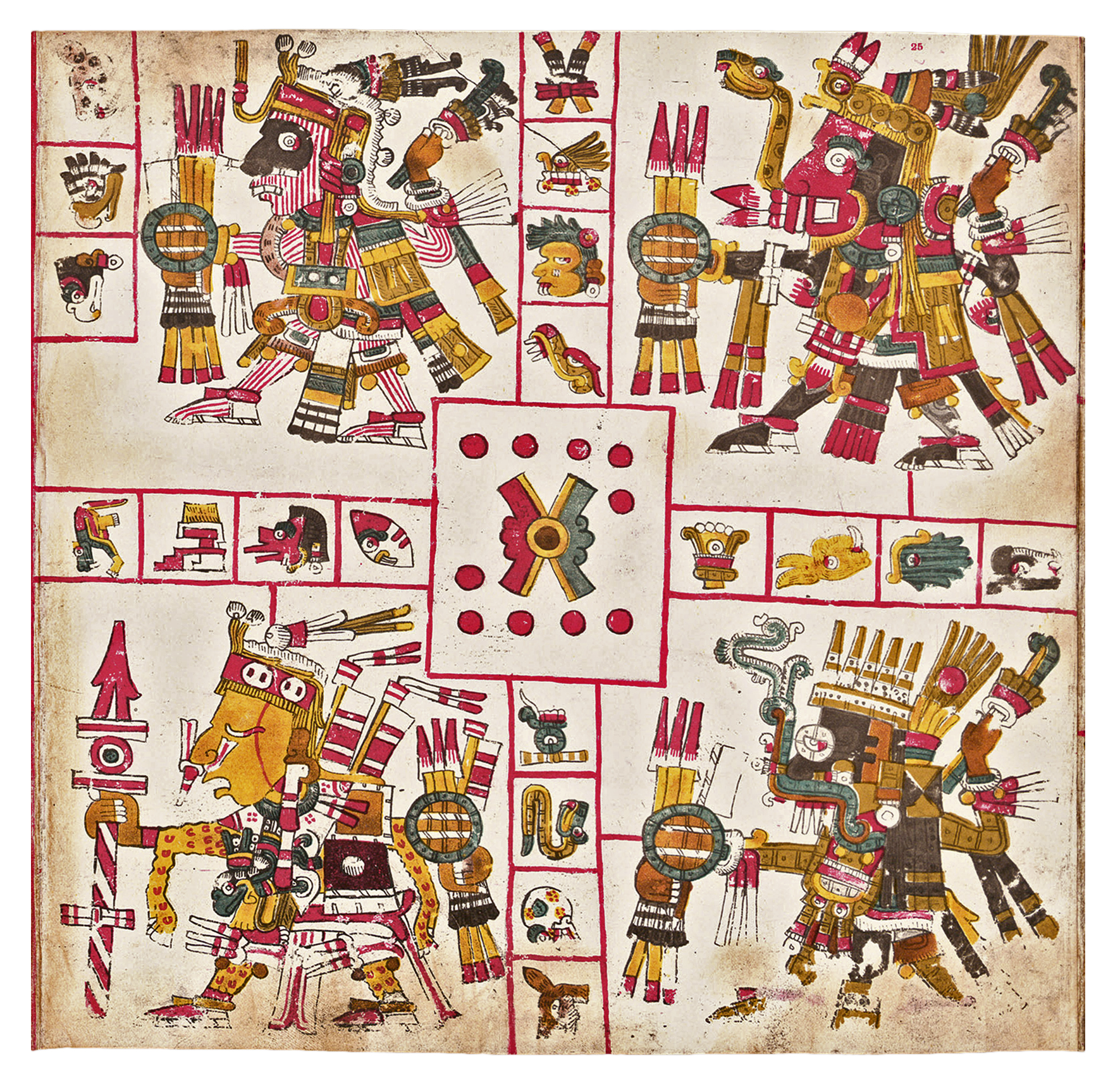 Page 25 du codex Borgia (fac-similé). Les 5 directions du cycle vénusien aztèque. Foundation for the Advancement of Mesoamercan Studies, Inc. (FAMSI).